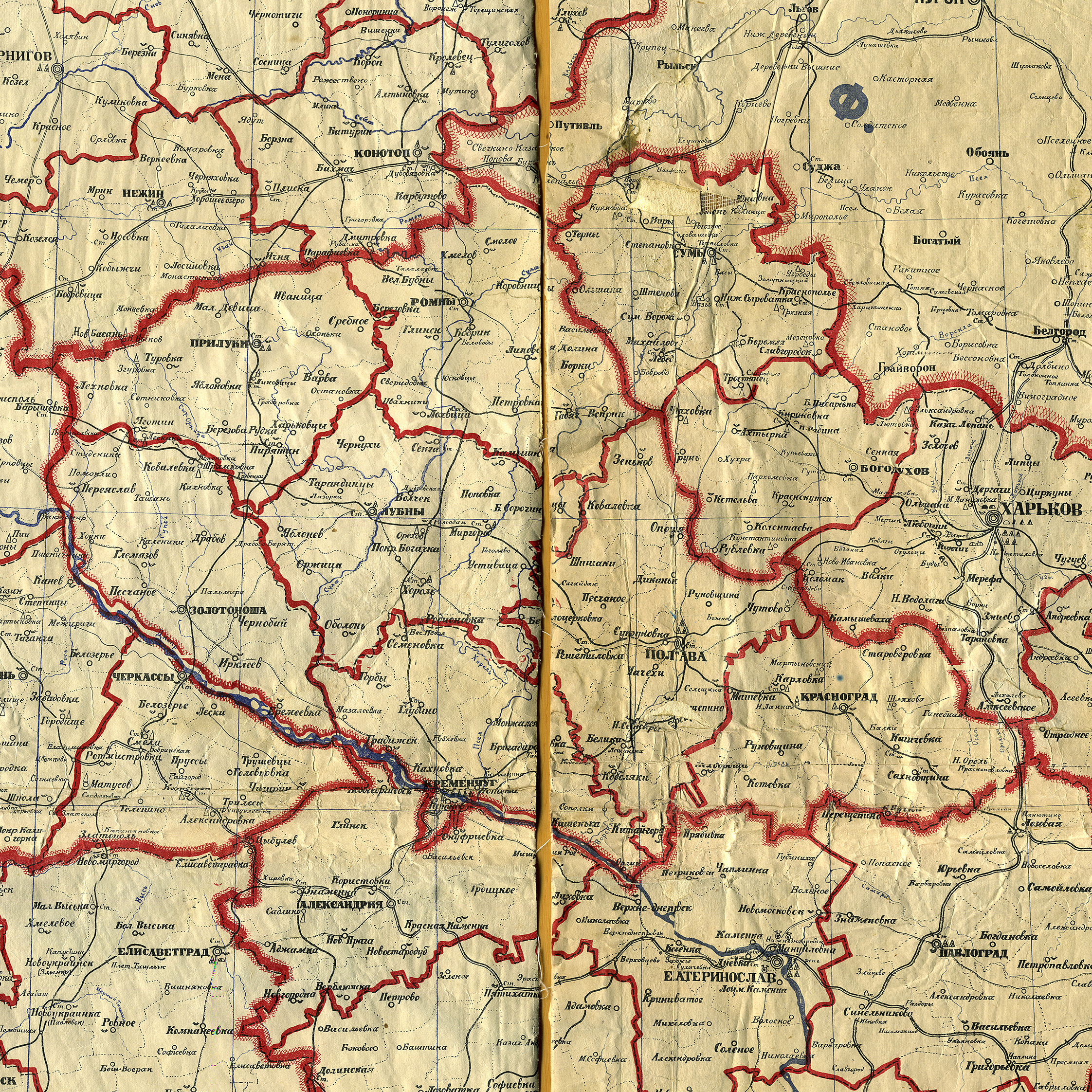 Полтавська губернія, фрагмент мапи Української соц. рад. республіки, адміністративний поділ після 12 квітня 1923 року